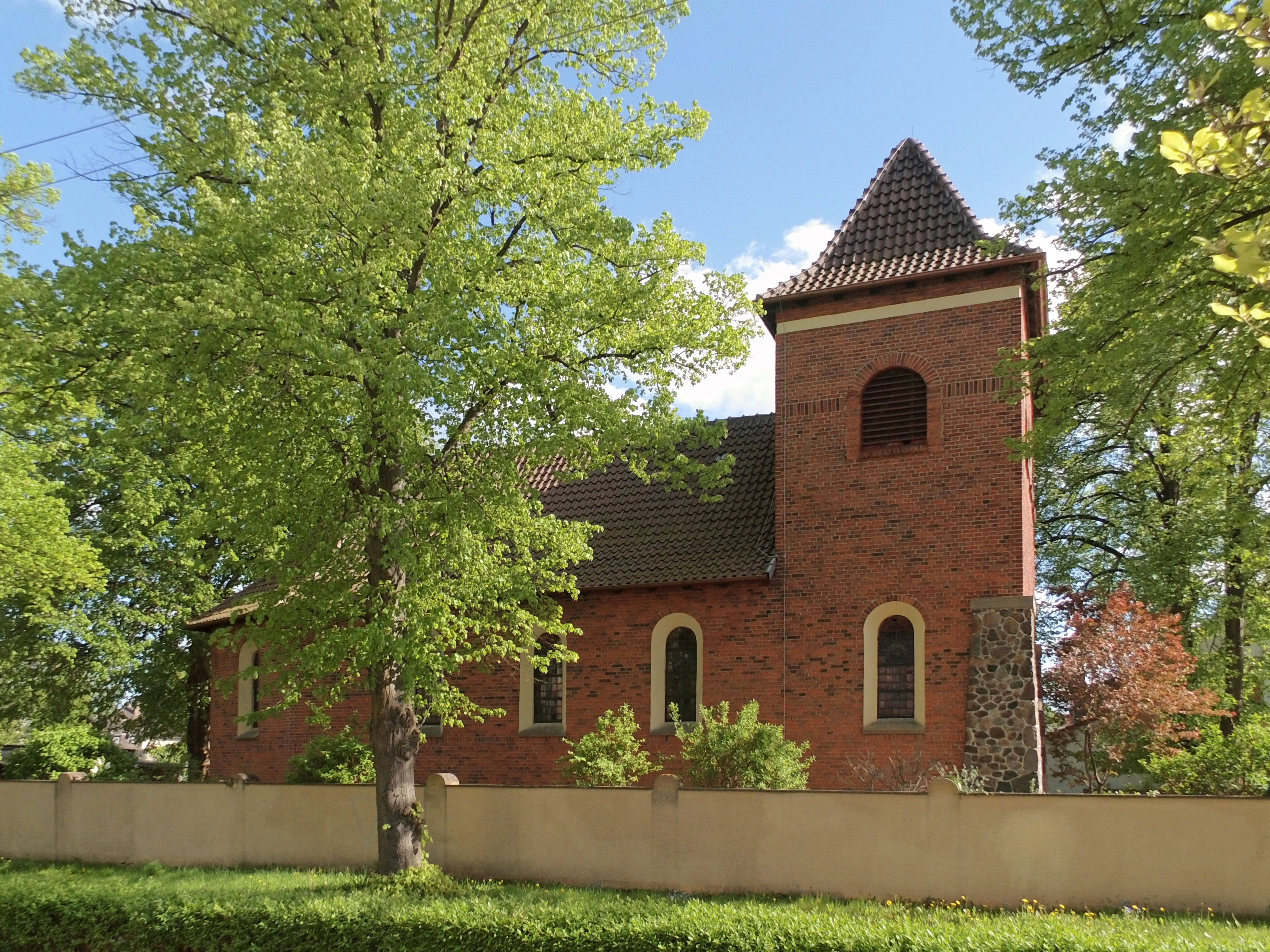 Römisch-katholische St.-Johannes-Baptist-Kirche in Seehausen (Landkreis Stendal)